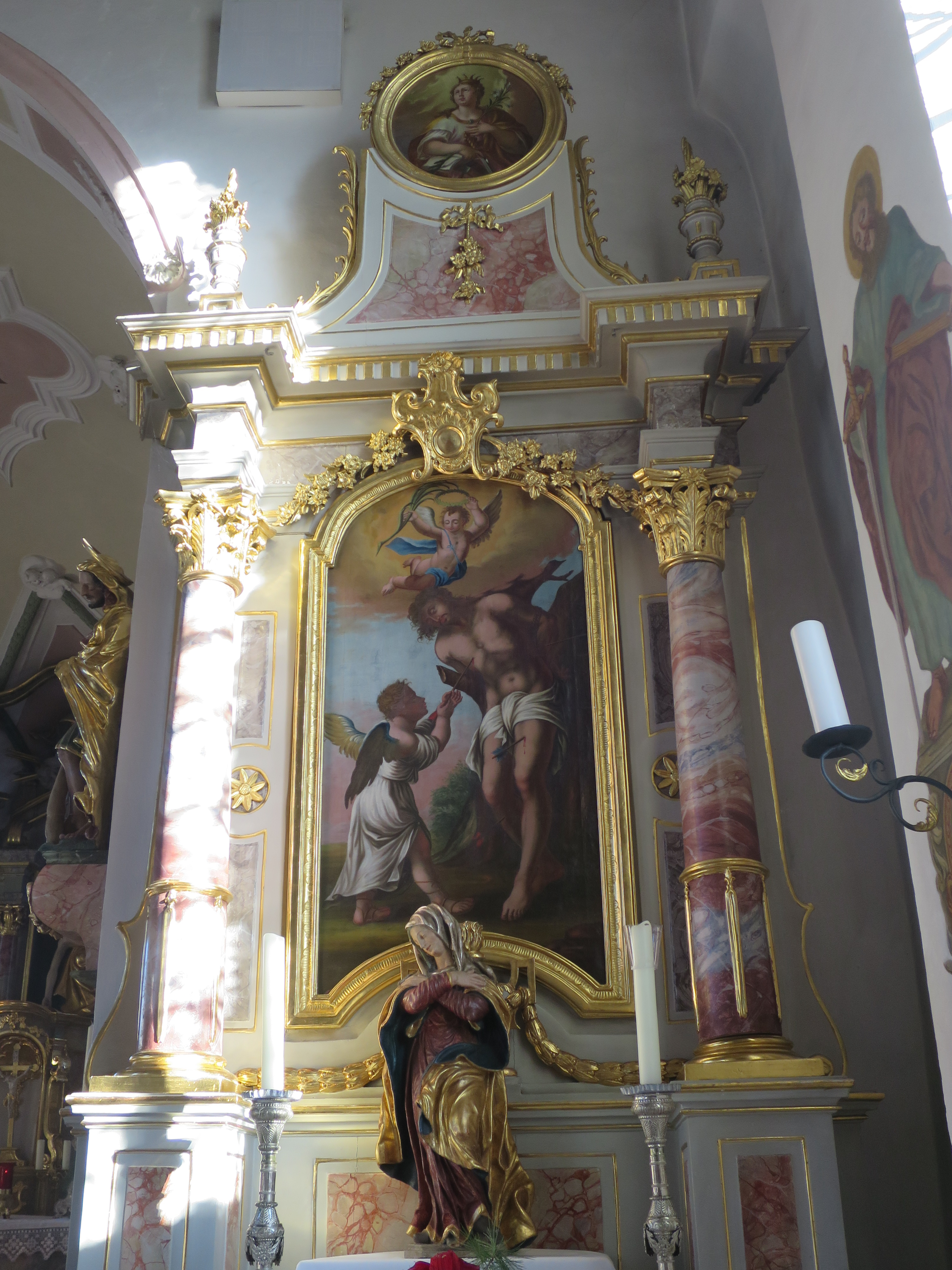 Seitenaltar 1. V. 19.JH. Ölbild Hl. Sebastian, im Auszug Hl. Katharina. (Angeblich Kopie nach J. B. Baader)